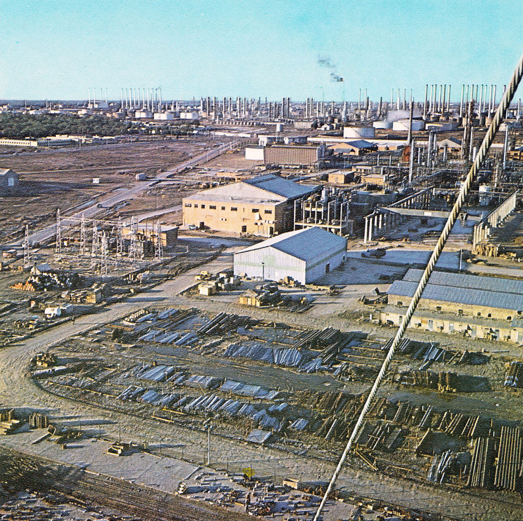 Abadan Oil Refinery